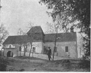 Černobílá fotografie chřešťovického kostela